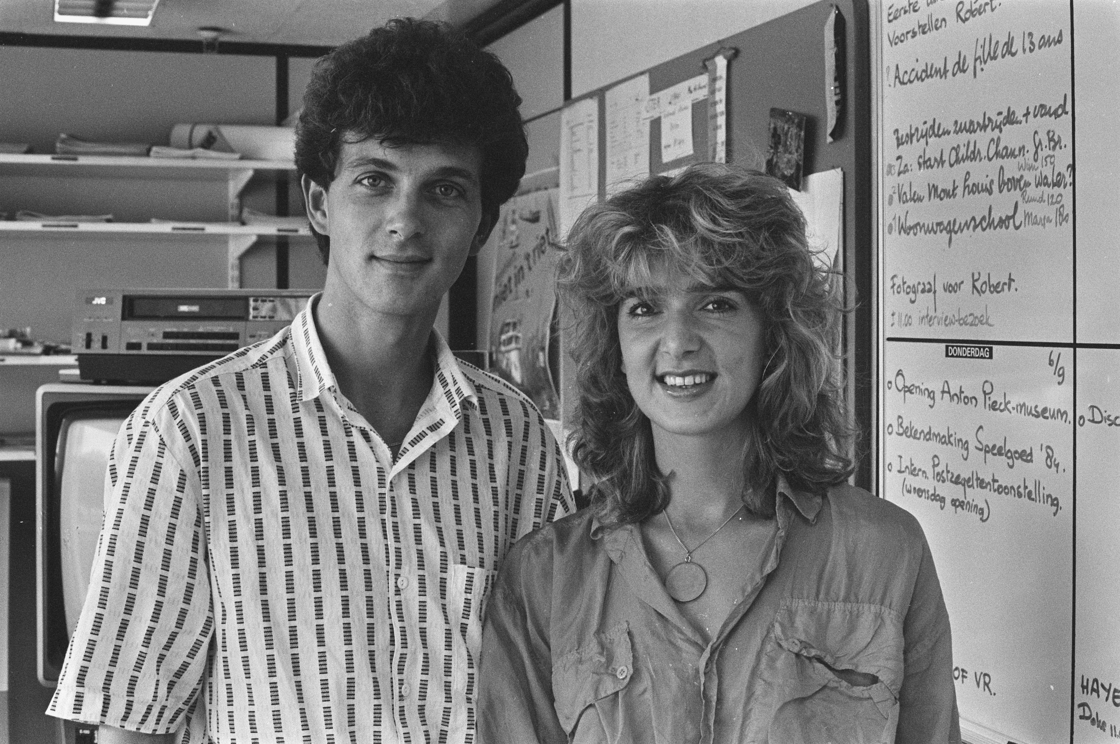 Collectie / Archief : Fotocollectie Anefo Reportage / Serie : [ onbekend ] Beschrijving : Naast Leonie Jansen nu ook Robert ten Brink als presentator in het Jeugdjournaal Datum : 3 september 1984 Trefwoorden : presentatoren, televisie Persoonsnaam : Brink, Robert ten, Jansen, Leonie Fotograaf : Bogaerts, Rob / Anefo Auteursrechthebbende : Nationaal Archief Materiaalsoort : Negatief (zwart/wit) Nummer archiefinventaris : bekijk toegang 2.24.01.05 Bestanddeelnummer : 933-0649 Reacties Geplaatst door Vilseledd op 17 januari 2011 - 12:16. Zou Leonie die prachtige ketting nog hebben?